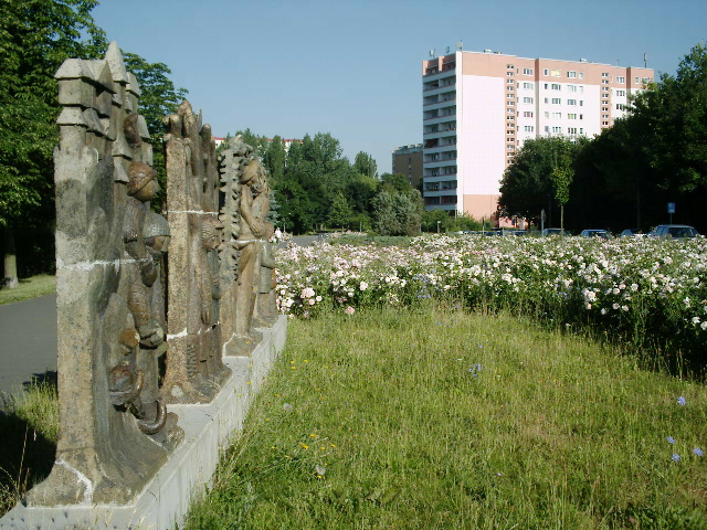 Blick auf den Heinz-Graffunder-Park mit den angrenzenden Skulputen